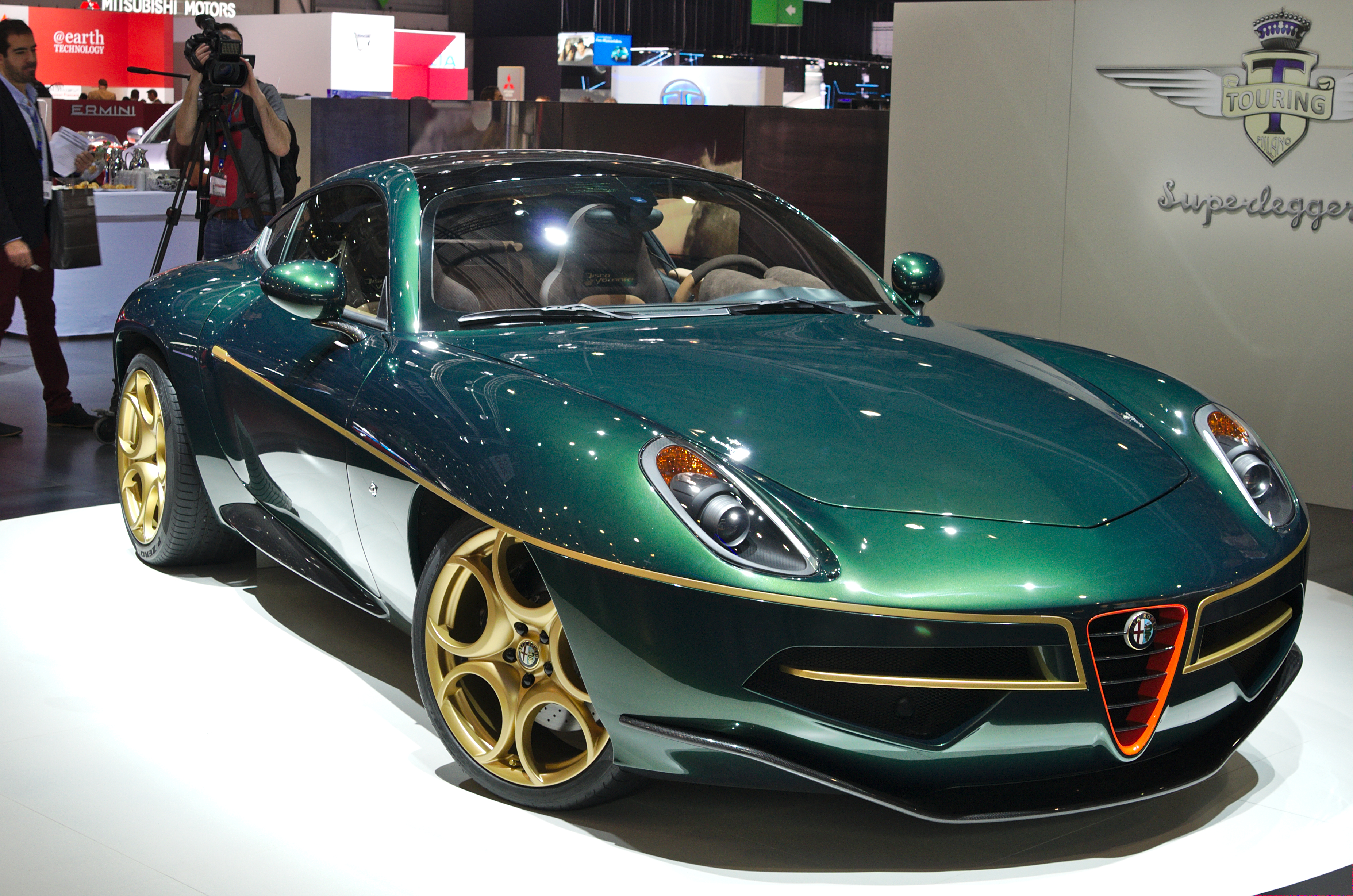 Salon de l'auto de Genève 2014 - 20140305 - Touring Superleggera Disco Volante